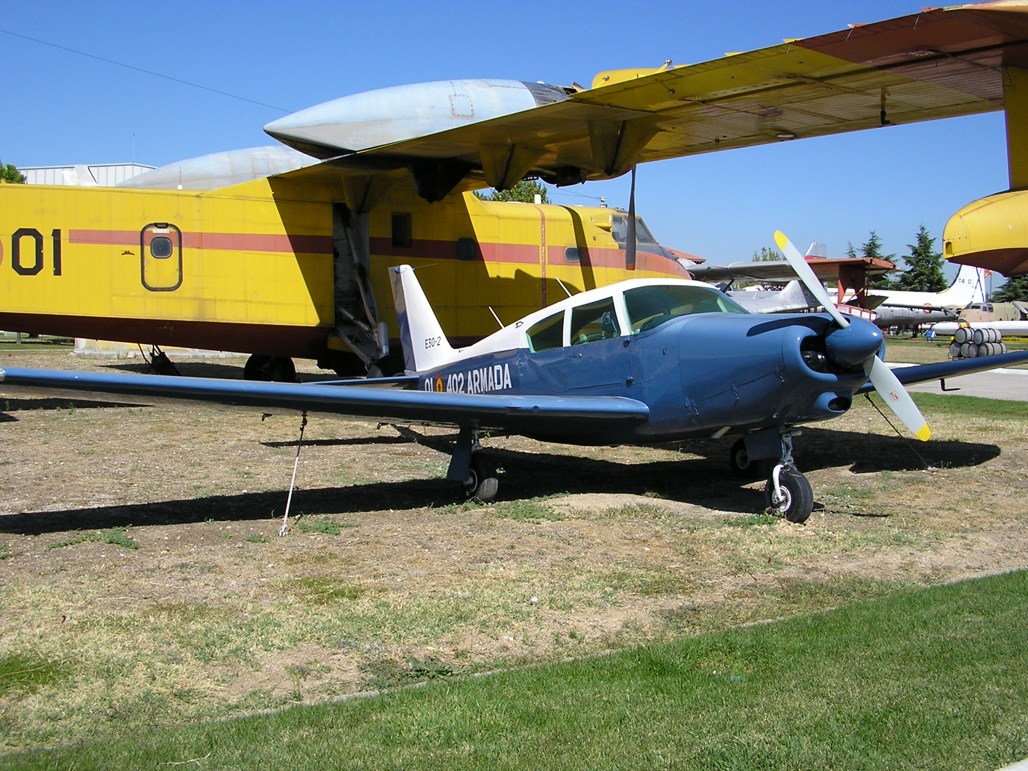 PA-24 Comanche в Мадридском Авиамузее, Museo del Aire